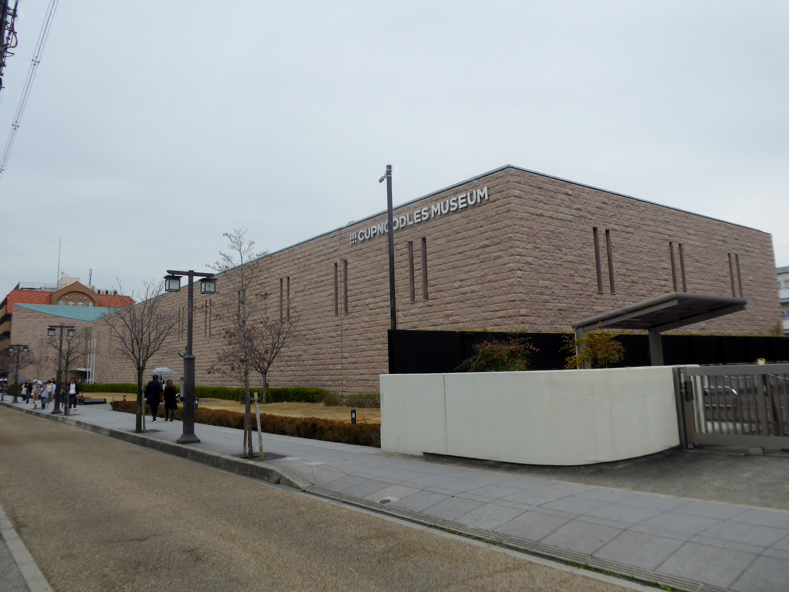 安藤百福発明記念館 大阪池田を撮影。 Panasonic Lumix DMC-TZ60